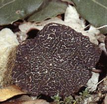 Trufa original